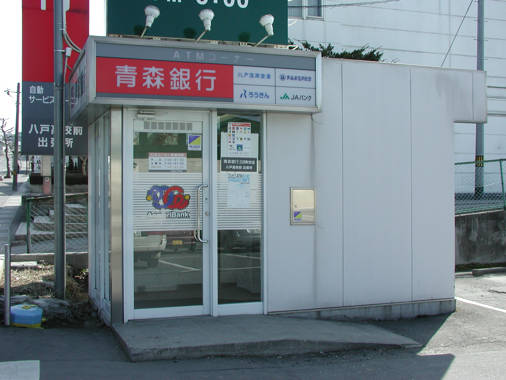 青森銀行ATMコーナーの一例：八戸高校前出張所（管理：三日町支店） 同行が展開しているATM利用手数料無料提携サービス「あすなろNET」の認知度を高めることを目的に、看板サイン表示が青森銀行のほかに同サービス提携金融機関も表示させている。